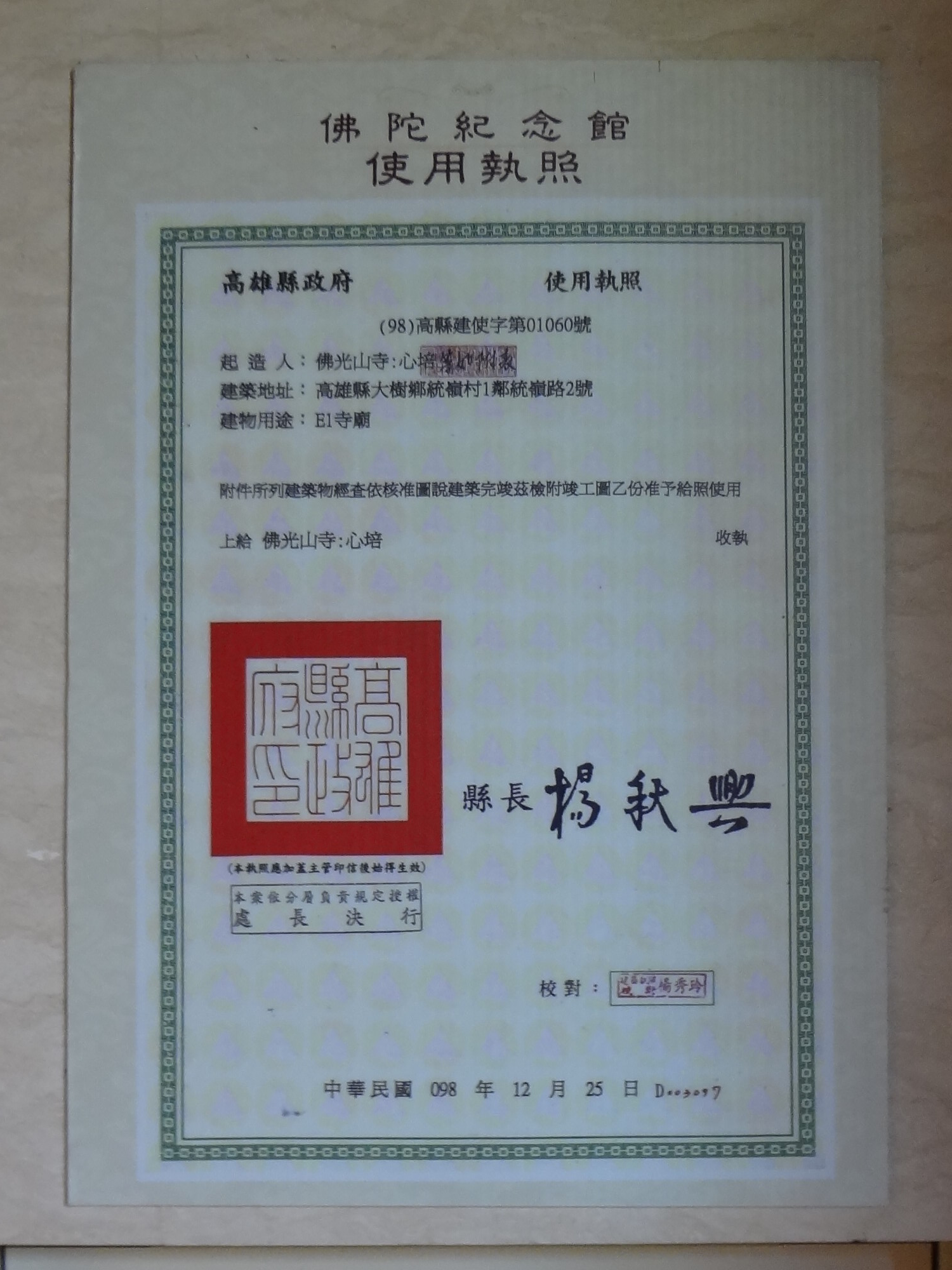 2009年12月25日，高雄縣政府核發的佛光山佛陀紀念館本館建築使用執照。